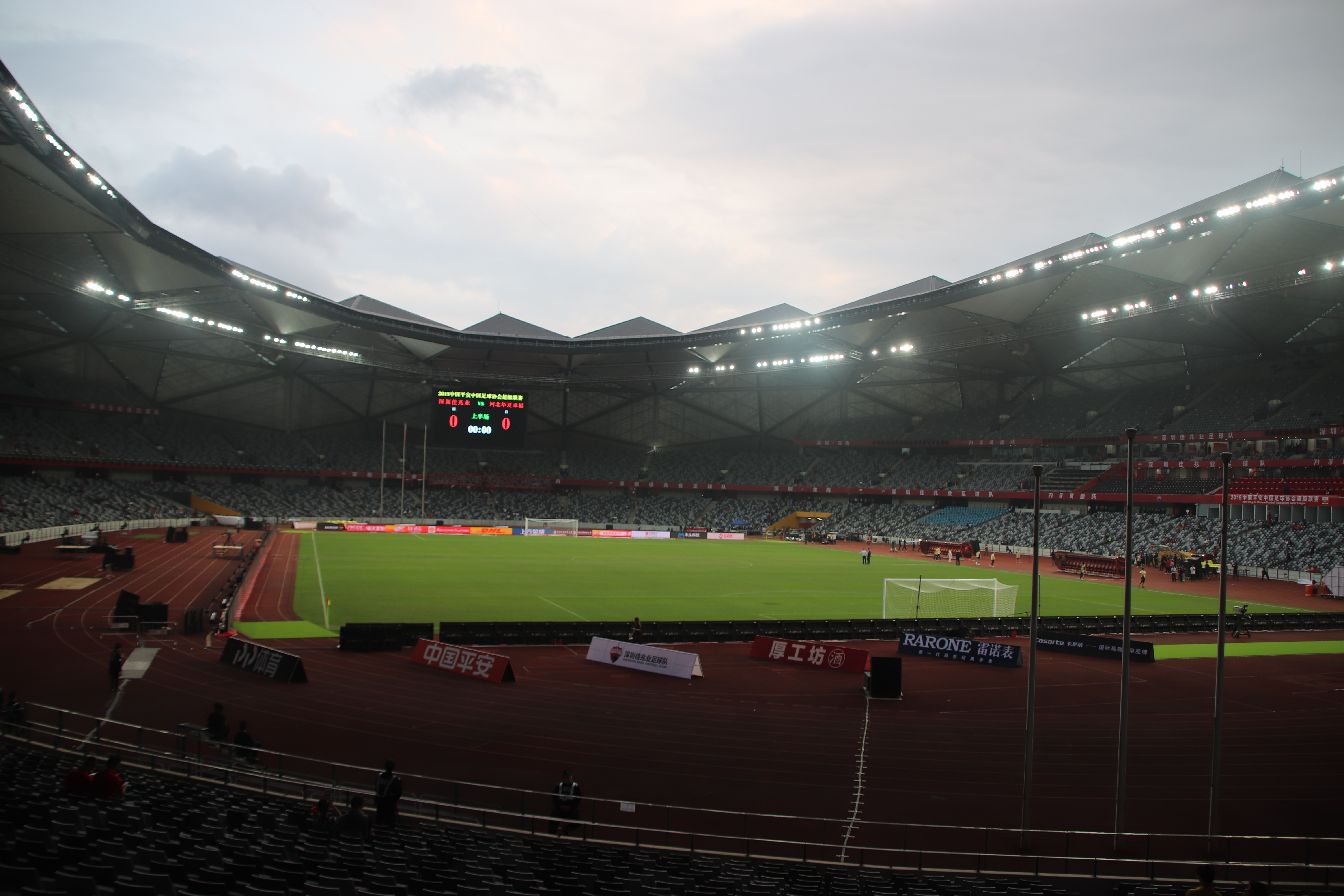 中文（中国大陆）: 深圳龙岗大运中心体育馆内部